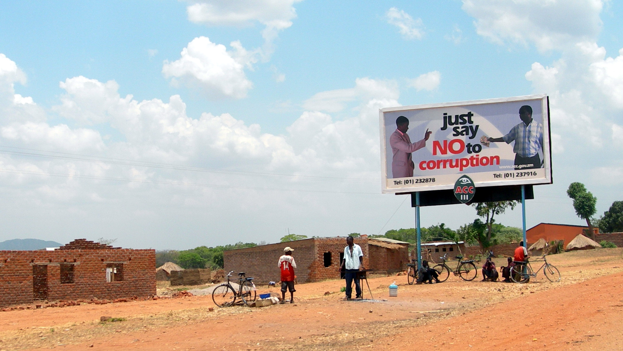 Say no to bribes (probably in Chipata), Zambia